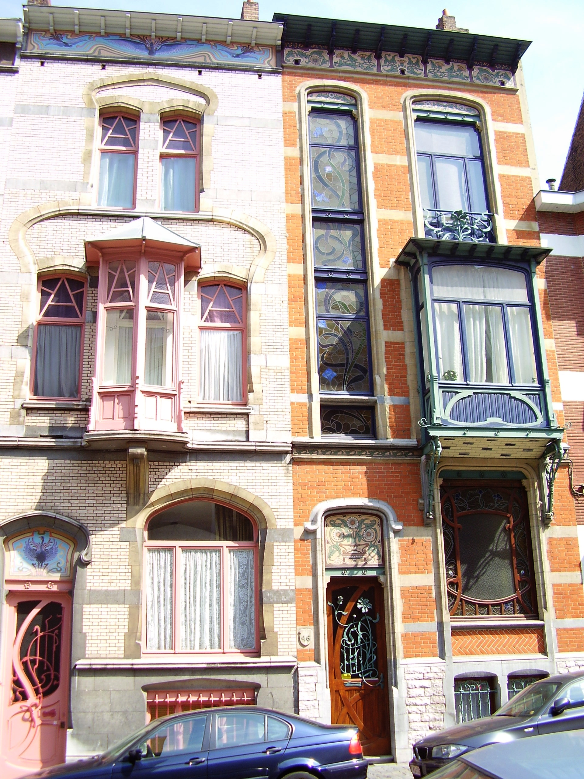 Description: 44-46 rue de Belle-Vue, Ixelles (Bruxelles). Ernest Blerot, architecte (1870-1957) Author: User:Ben2 Date of creation: 17 juin 2006 Source: Photo personnelle